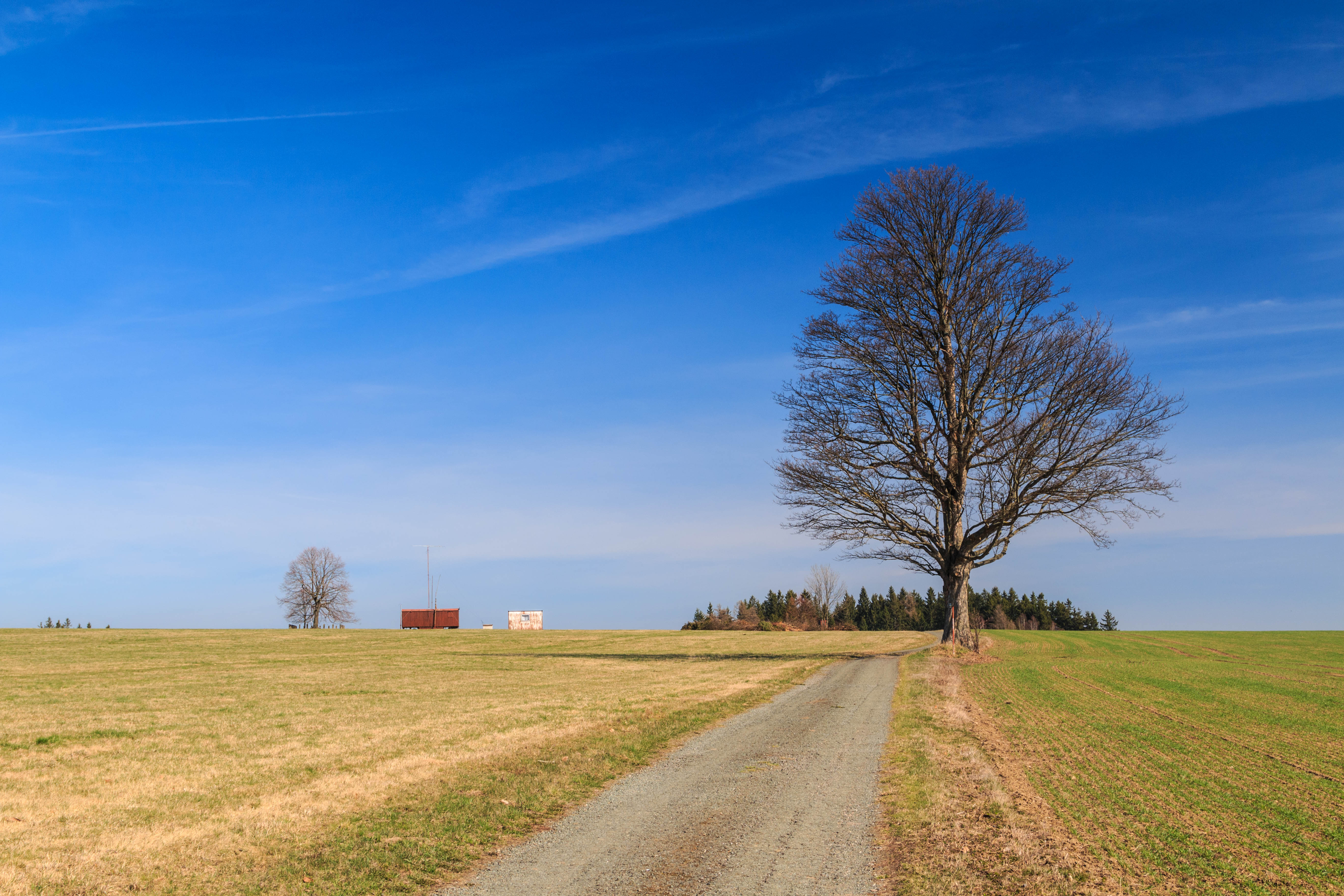 kopec Spálava